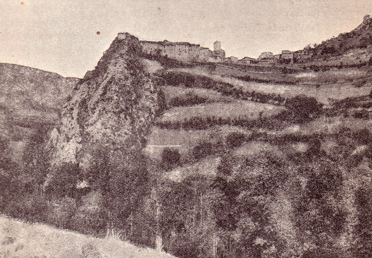 Fotografia de Sarroca de Bellera (Pallars Jussà)